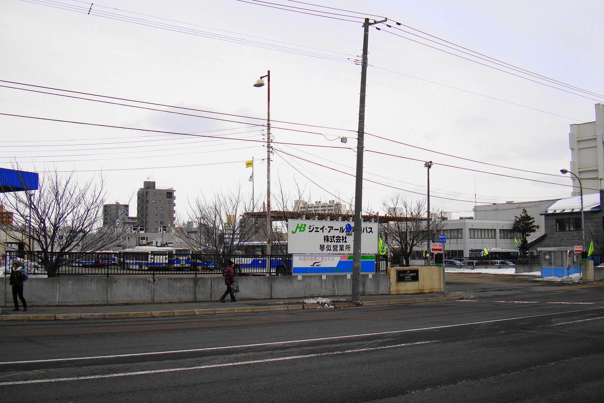 Kotoni depot